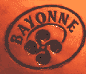 Sceau du consortium du Jambon de Bayonne appliqué sur chaque jambon de Bayonne